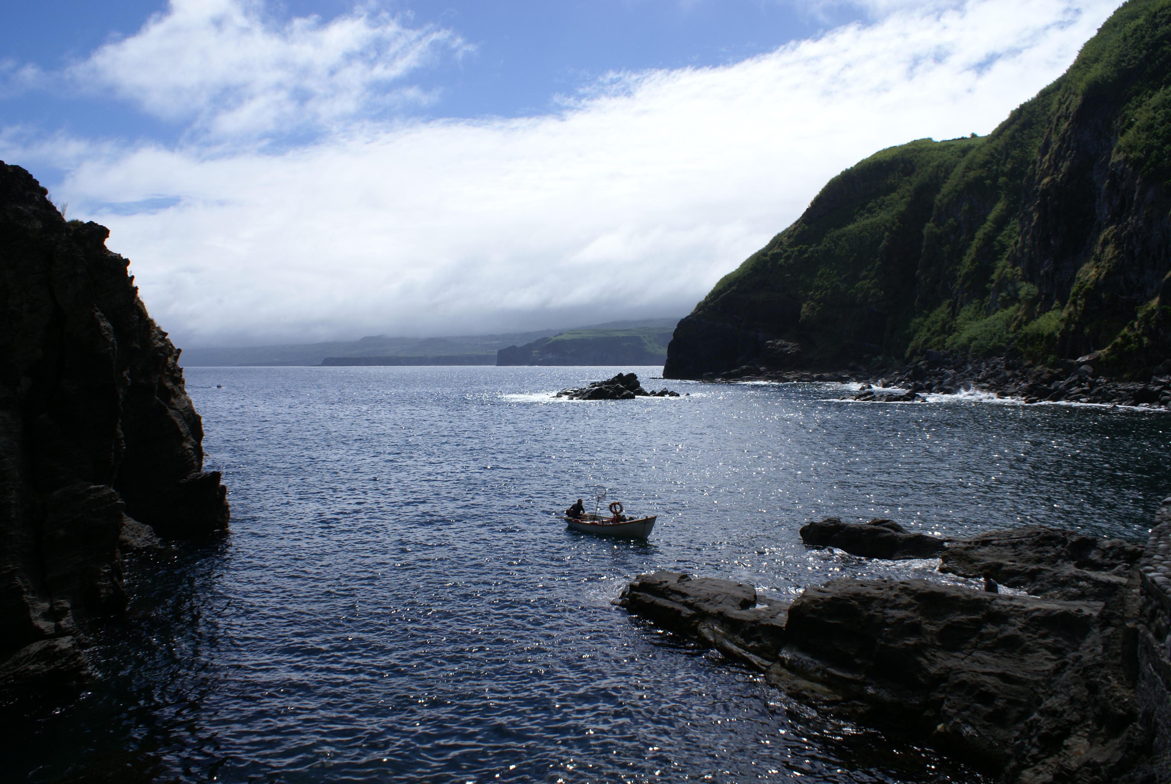 Ponta do Cintrão, ilha de São Miguel, Açores